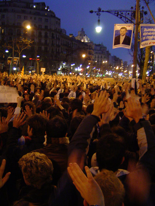 Manif de barcelone contre les atentats du 11 mars 2004